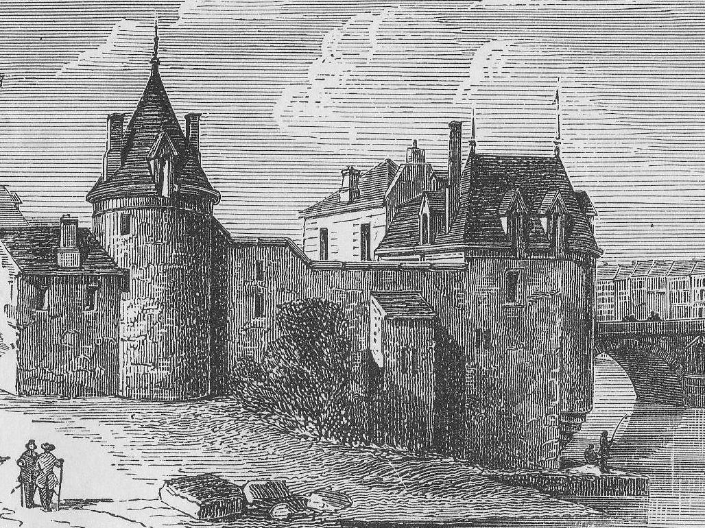 Château de la Tournelle à Paris sous Louis XIII